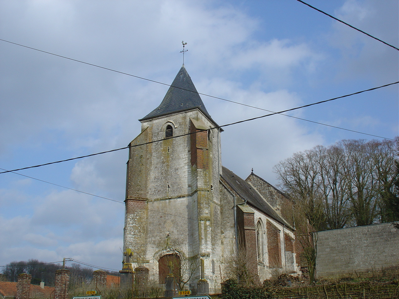 Église de Fontaine-l'Étalon